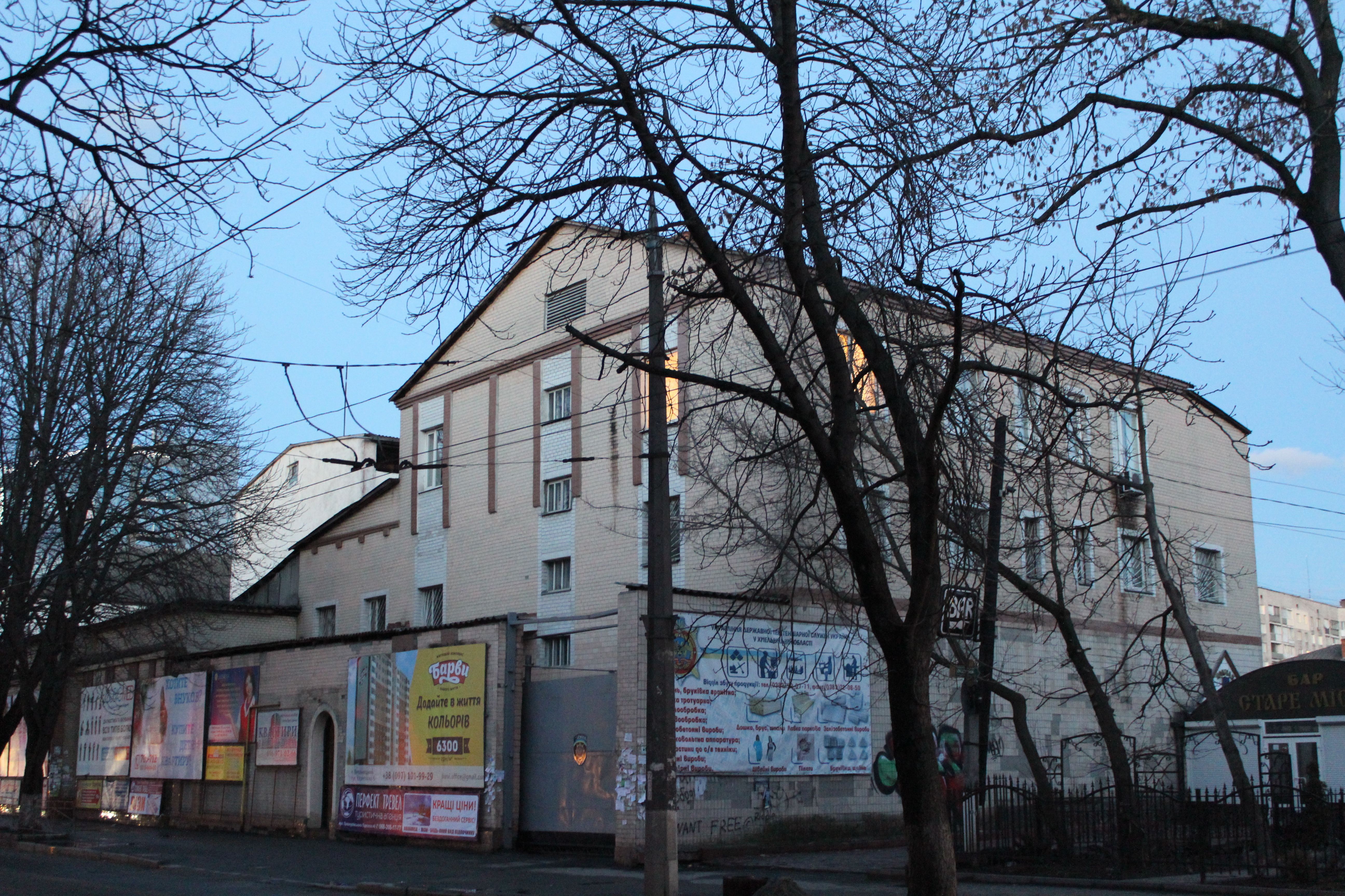 Споруда, Хмельницький, вул. Кам'янецька, 41